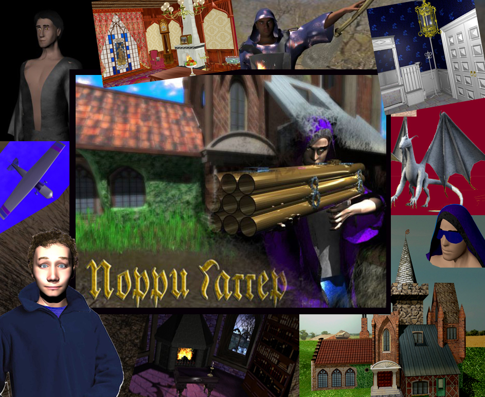 "Постер" мультфильма "Порри Гаттер"